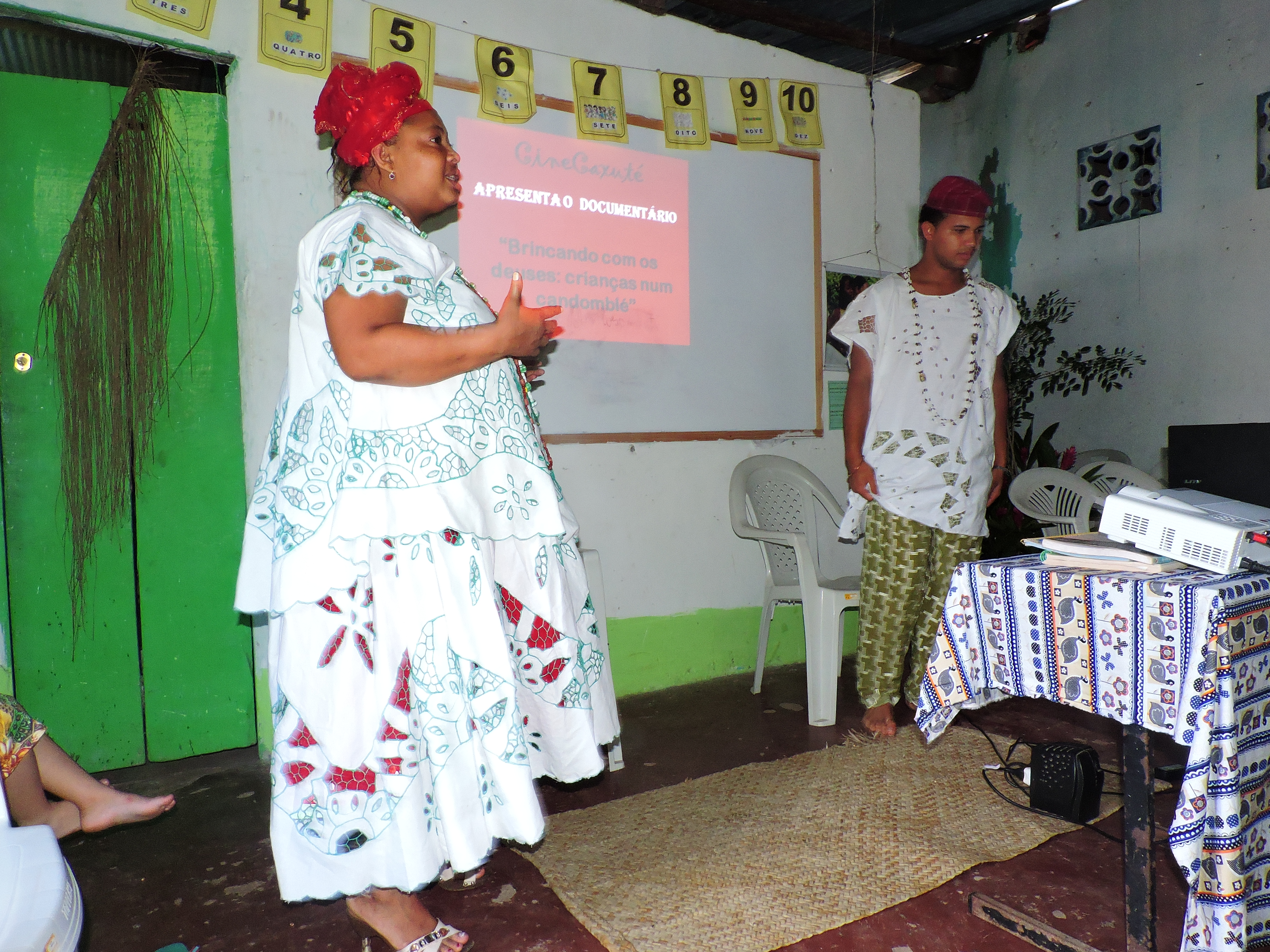 Lançamento do projeto Cinema de Terreiro - CineCaxuté